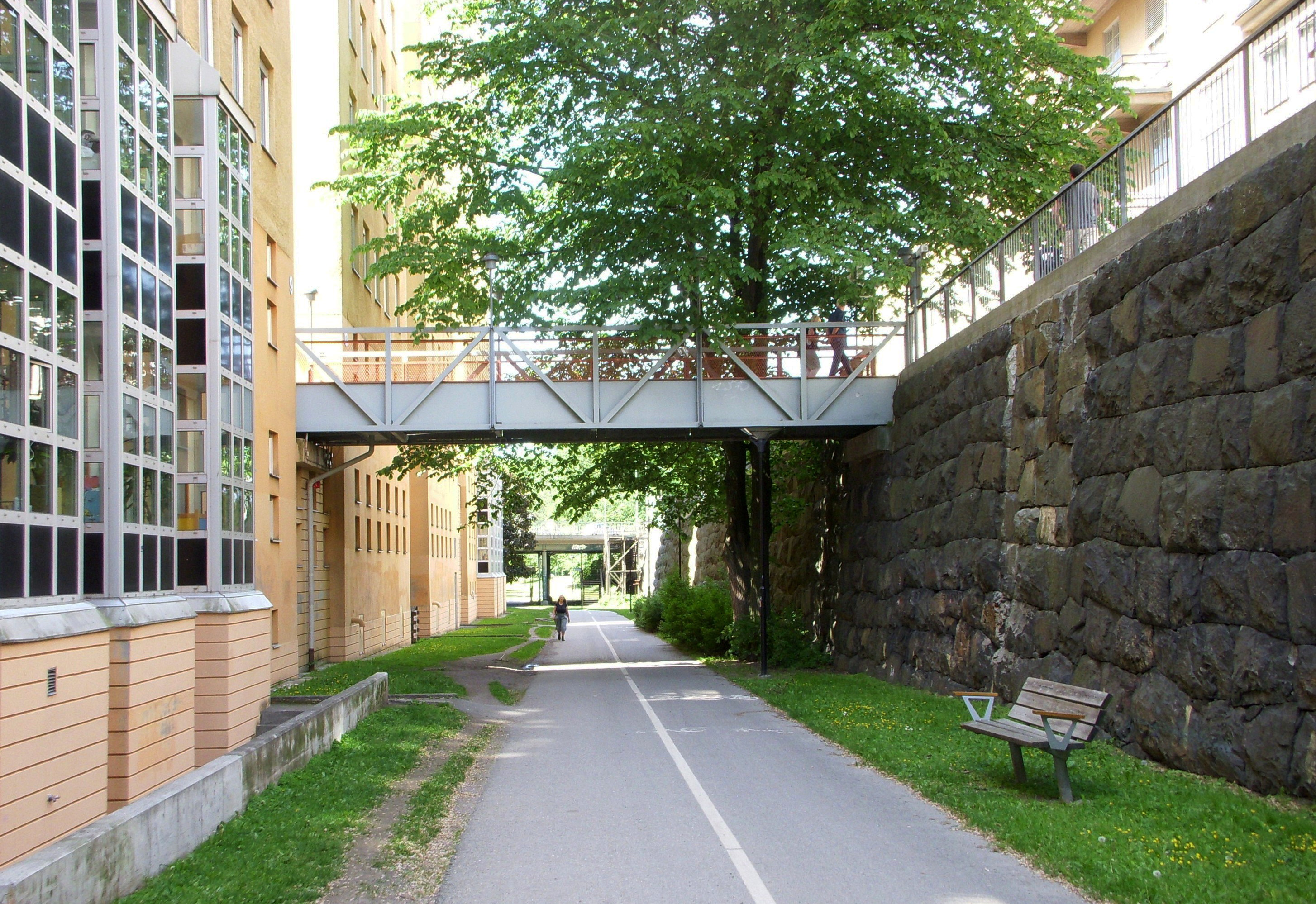 Maria Bangata, nedsänkta delen där en gång järnvägen gick